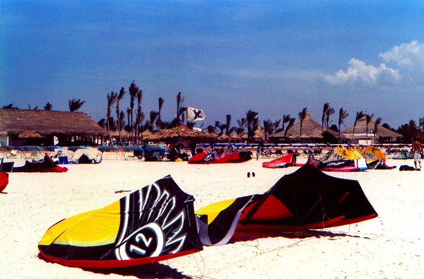 Power Kytes at Coche, Venezuela